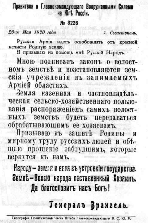 приказ Главкома ВСЮР П.Н. Врангеля